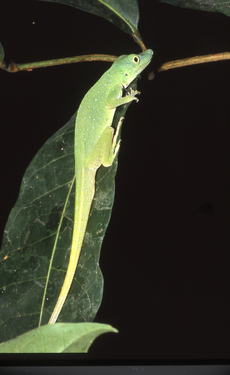 Anolis punctatus